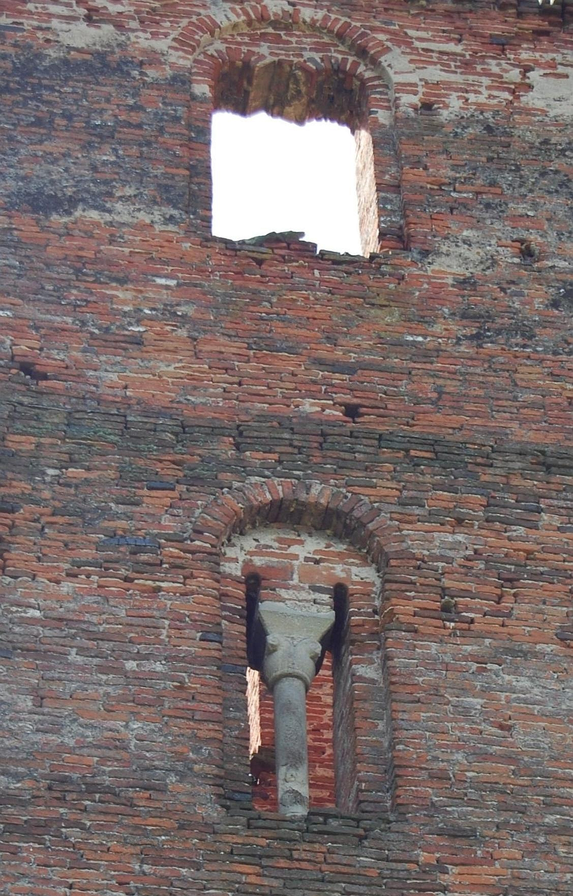 Belényesszentmiklós - Pálos rendi kolostor - XIII. sz.